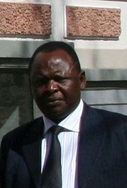 Gerald Otieno Kajwang Tartus, 9. mai 2014